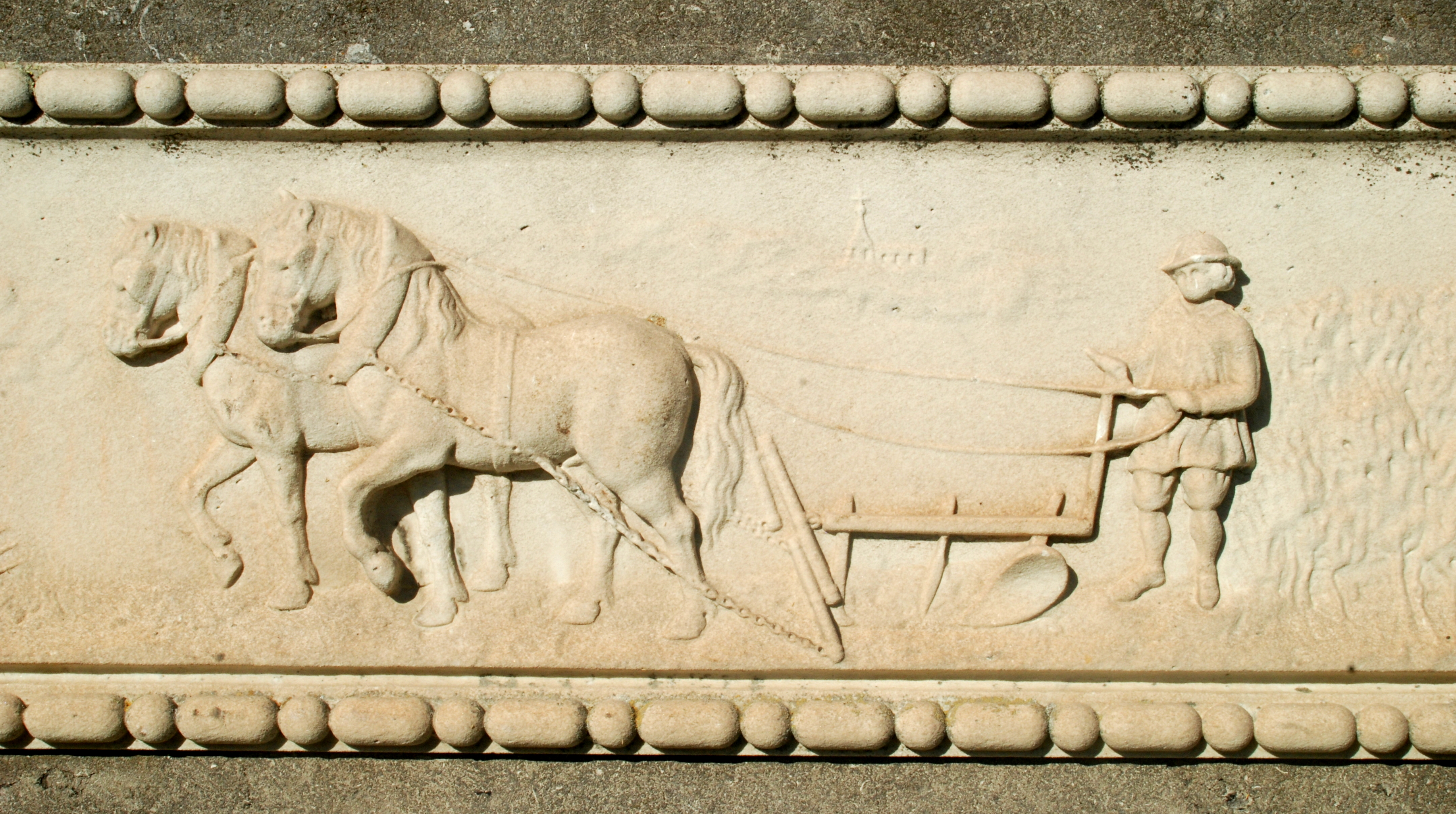 Belgique - Brabant wallon - Nivelles - Eglise Sainte-Marguerite de Thines